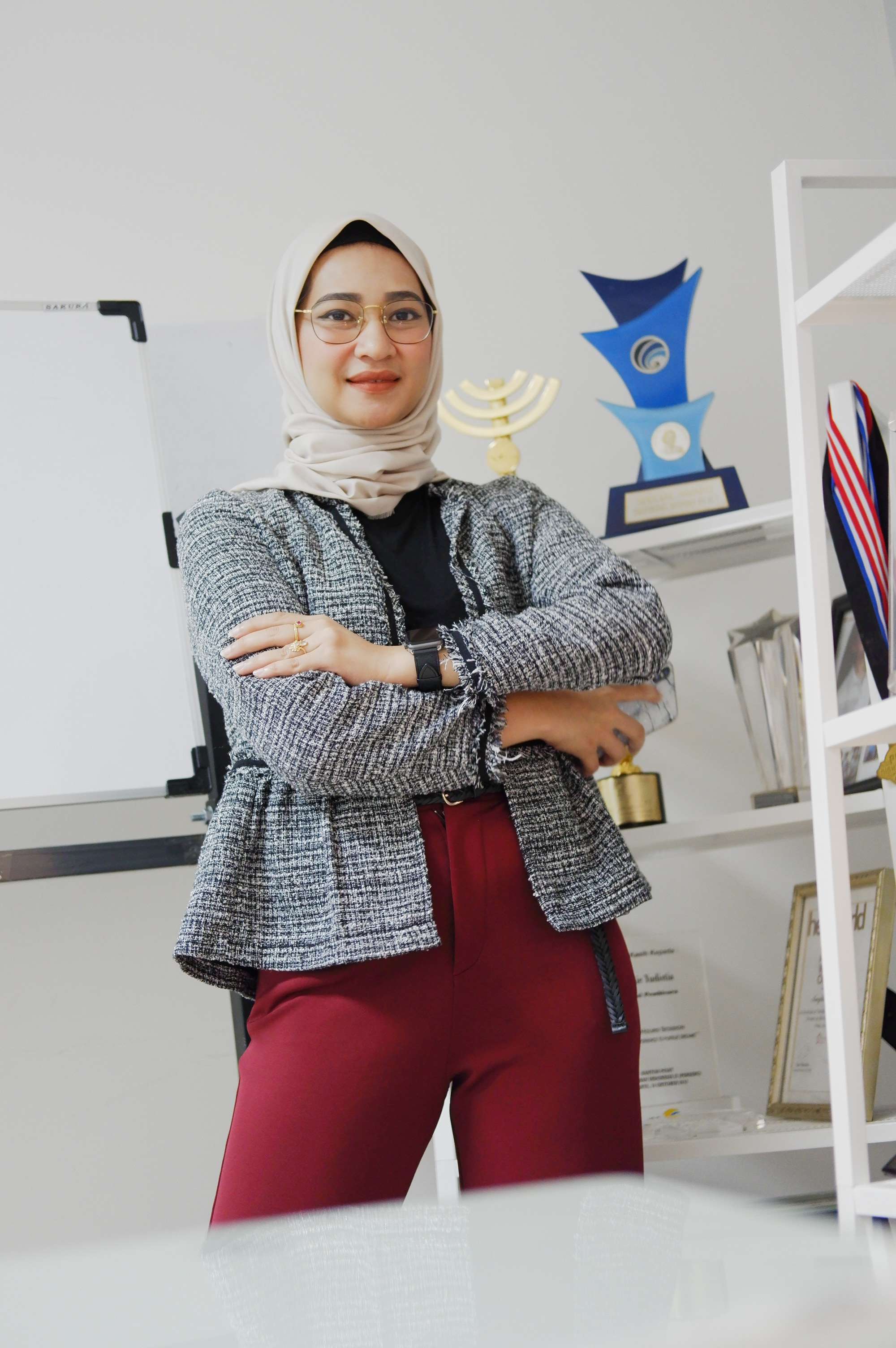 Sosok yang menginspirasi kalangan muda untuk berkreatif menembus batas